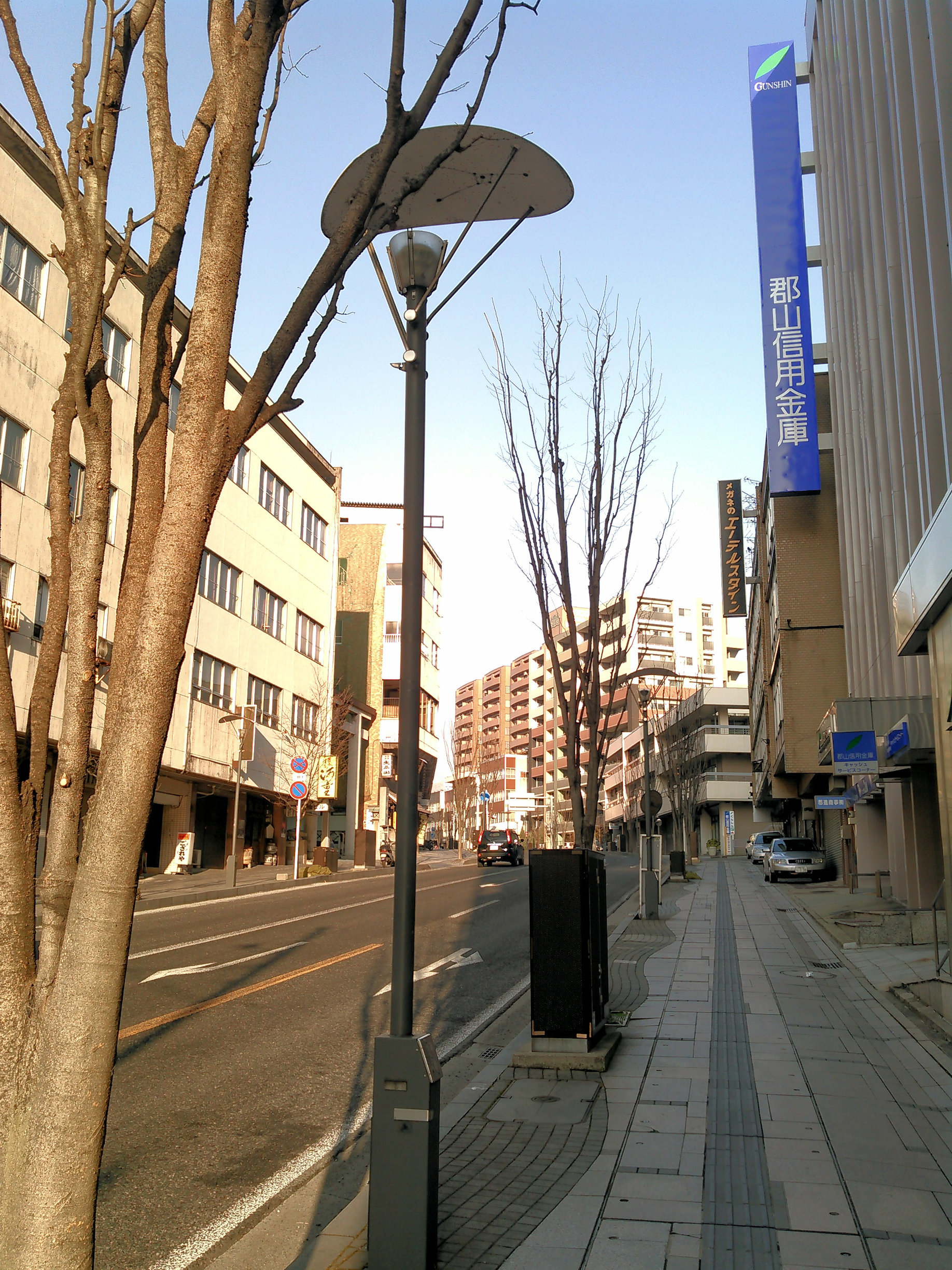 郡山さくら通り清水坂